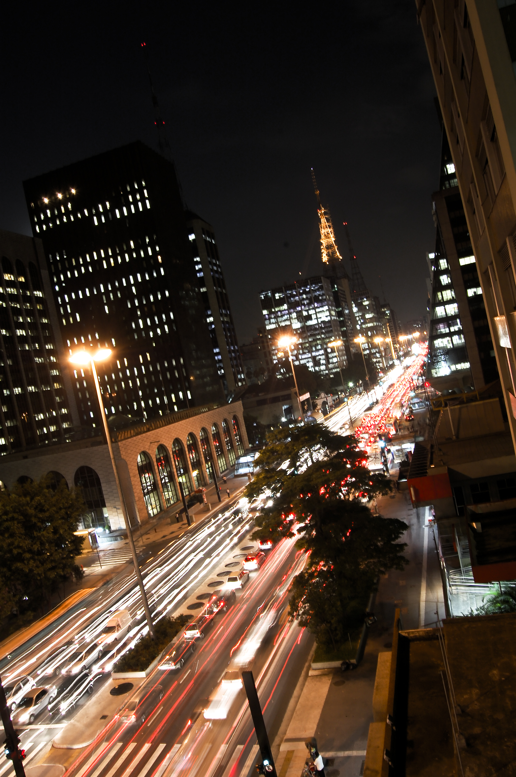 Avenida Paulista, São Paulo, Brasil.